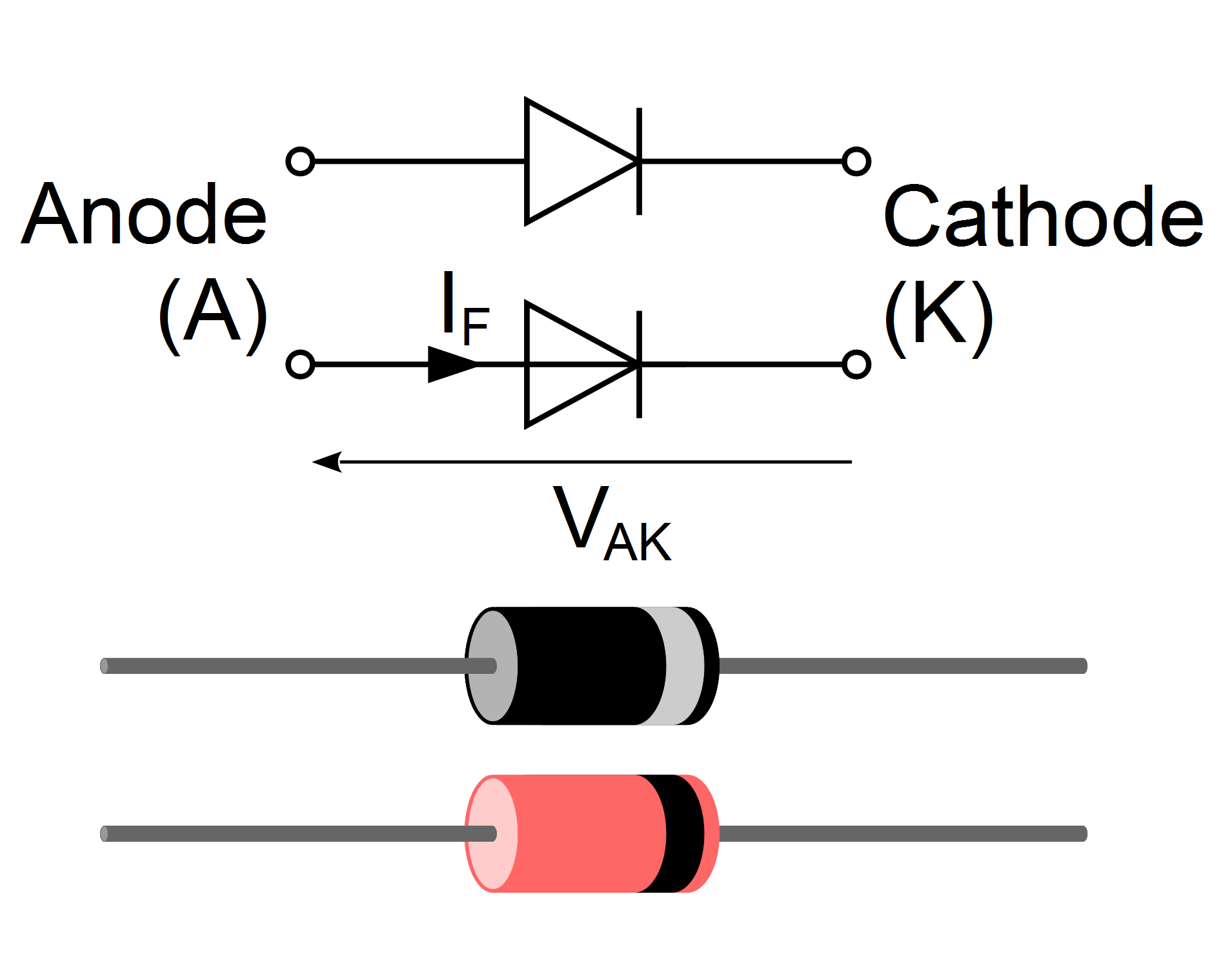 Symbole de la diode avec en parallèle le boitier standard et l'emplacement de la cathode (K)